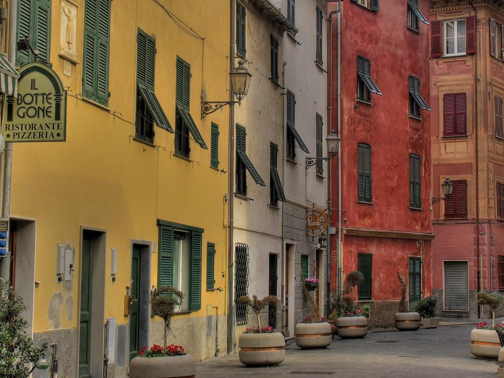 Cavi di Lavagna, Liguria, Italia